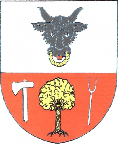 znak, Ujčov, okres Žďár nad Sázavou